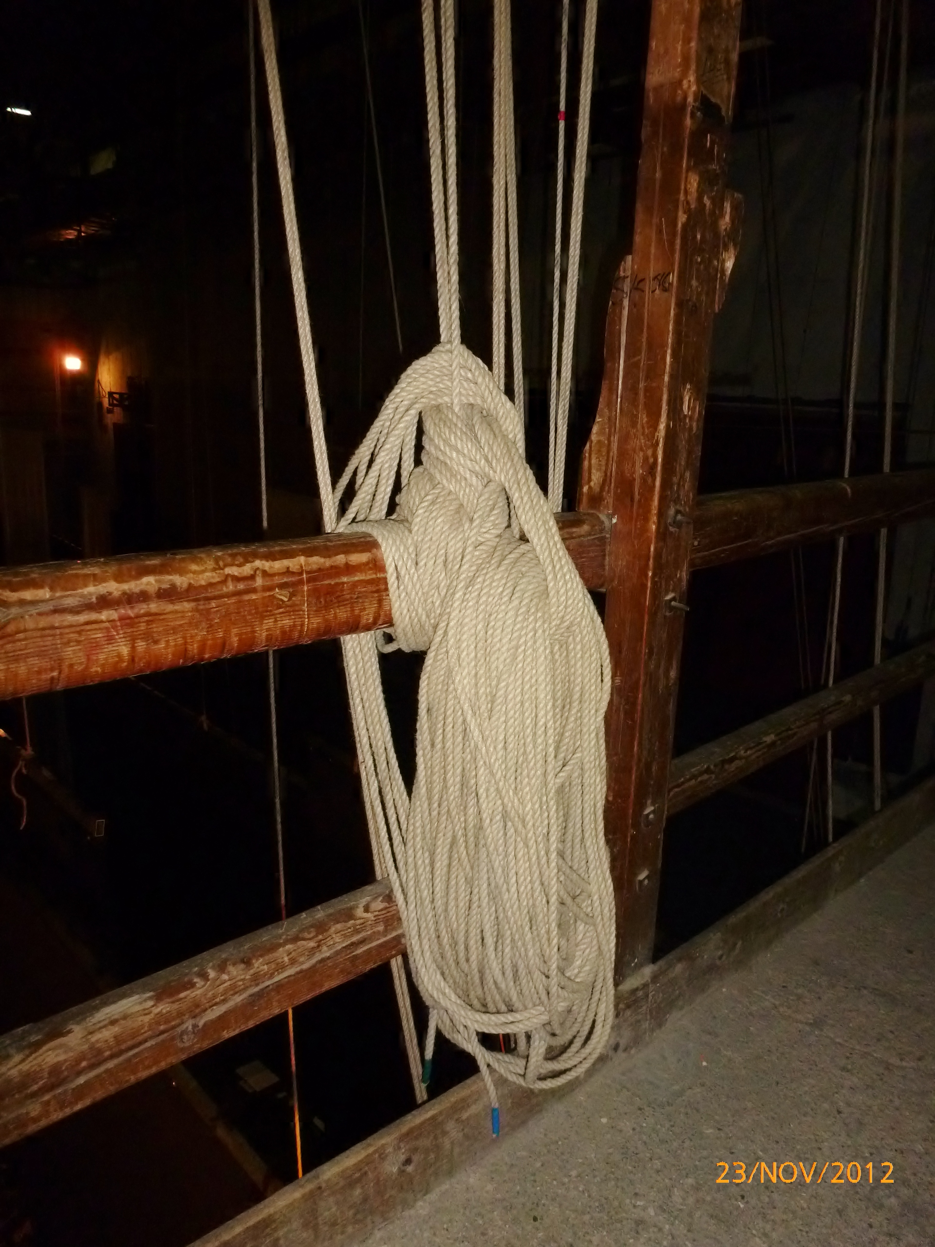 Corda di canapa da 8mm